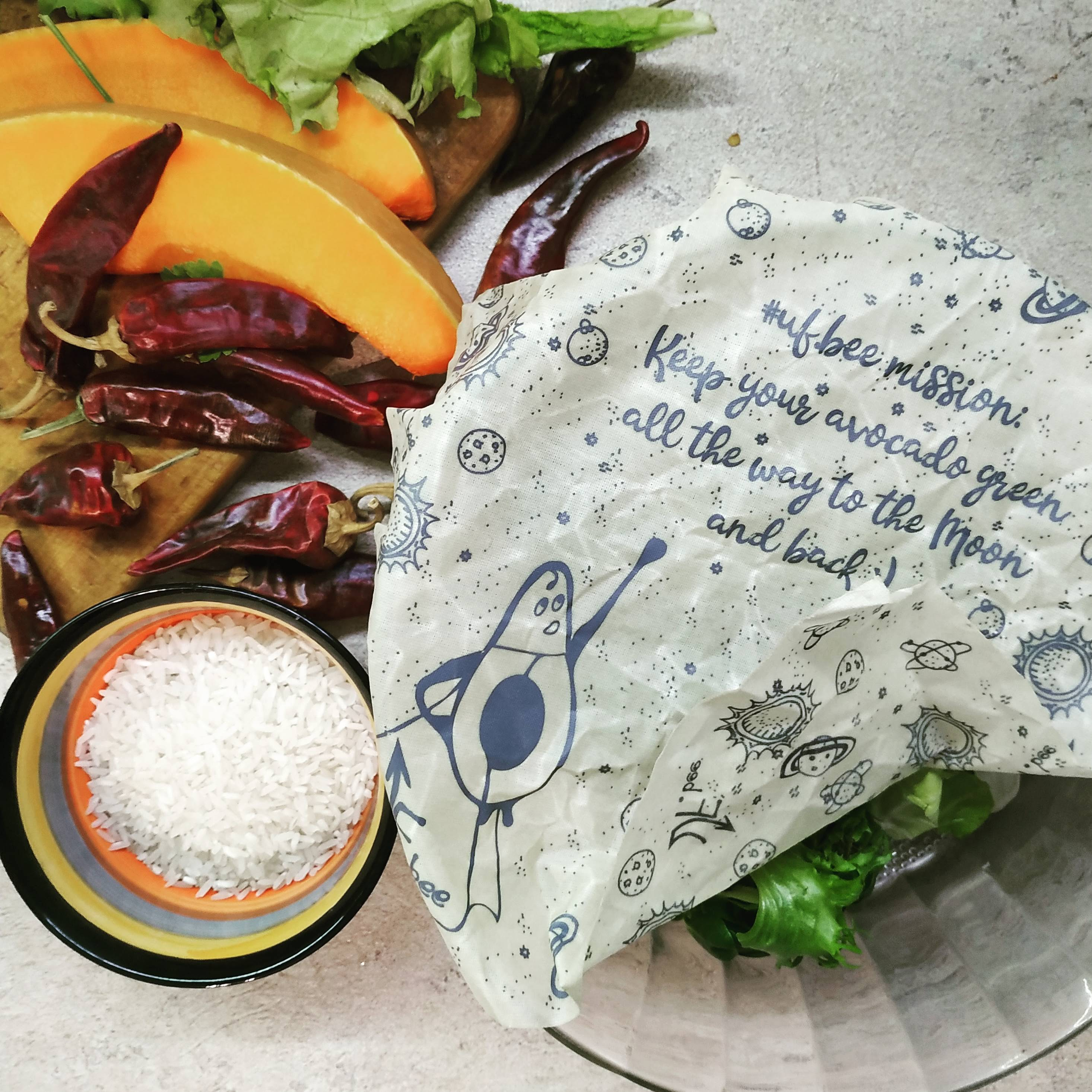 Обгорткою можна накривати посуд (тільки з охолодженими продуктами), у неї можна загортати продукти чи формувати з неї мішок або будь-який інший тип упакування.